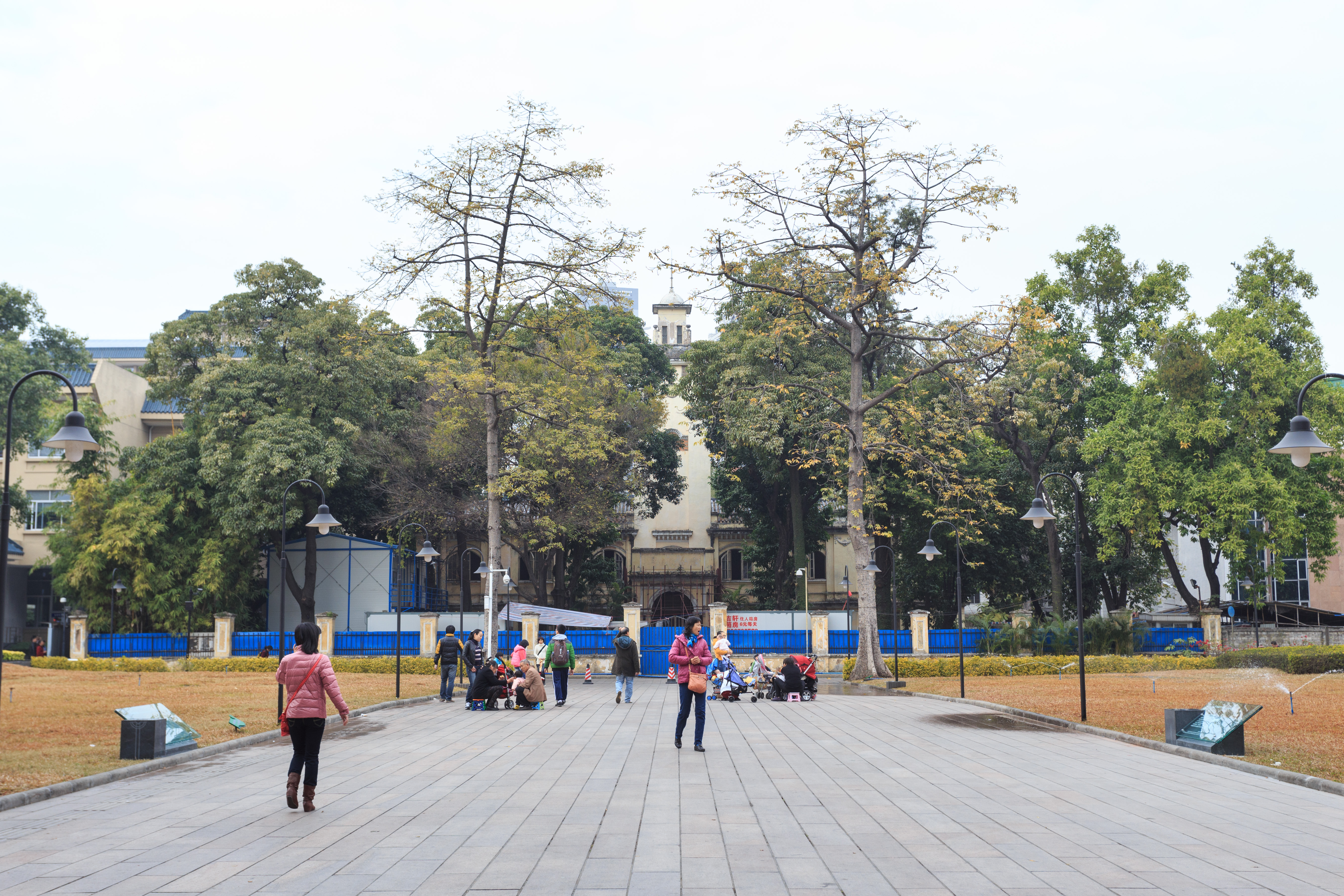 广州中国国民党第一次全国代表大会旧址